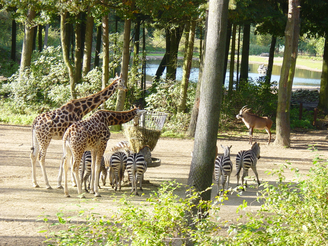 zebras and giraffes in Burgers Zoo, Arnheim, NL